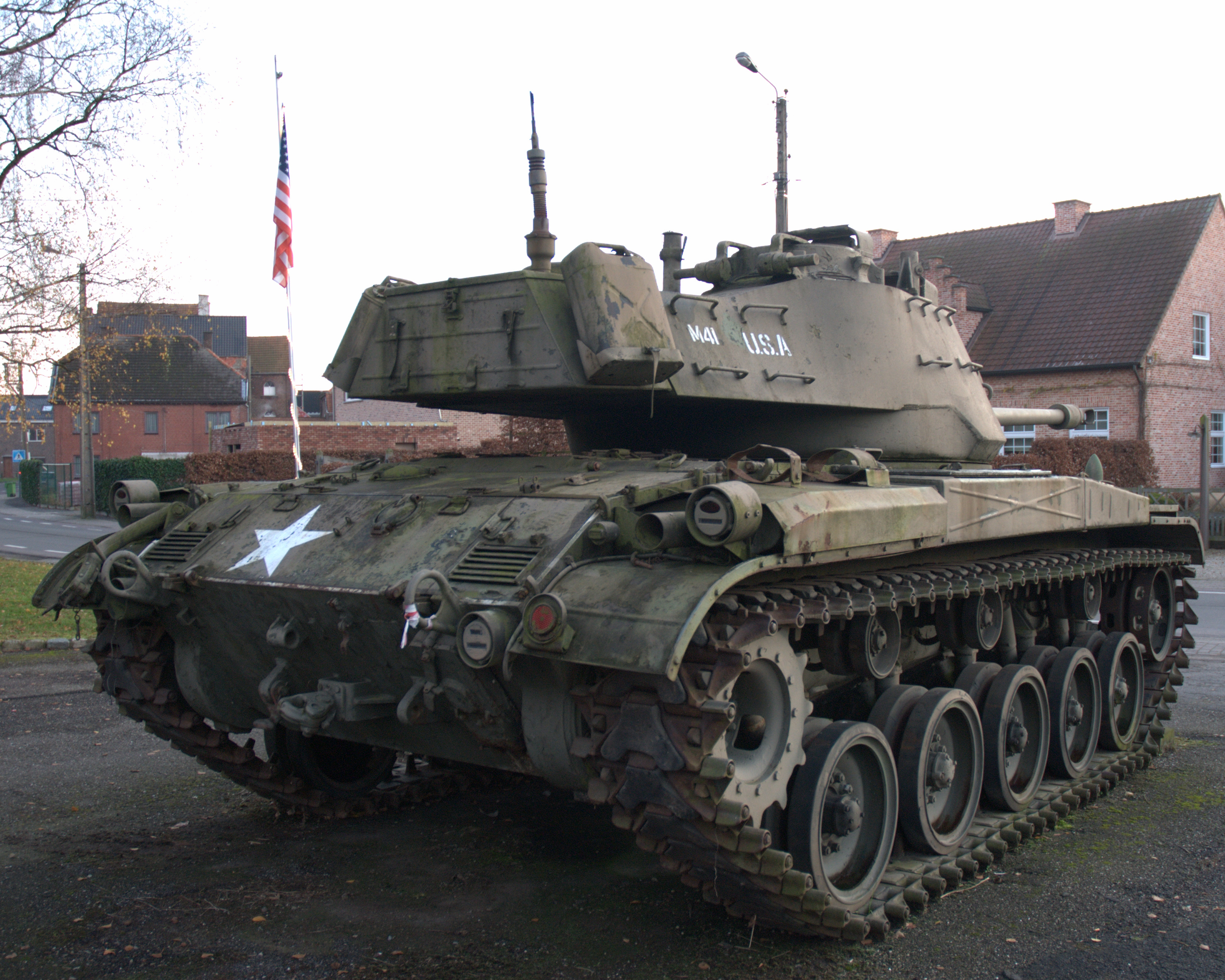 Amerikaanse tank M41 Walker Bulldog te Ulbeek, Wellen, België